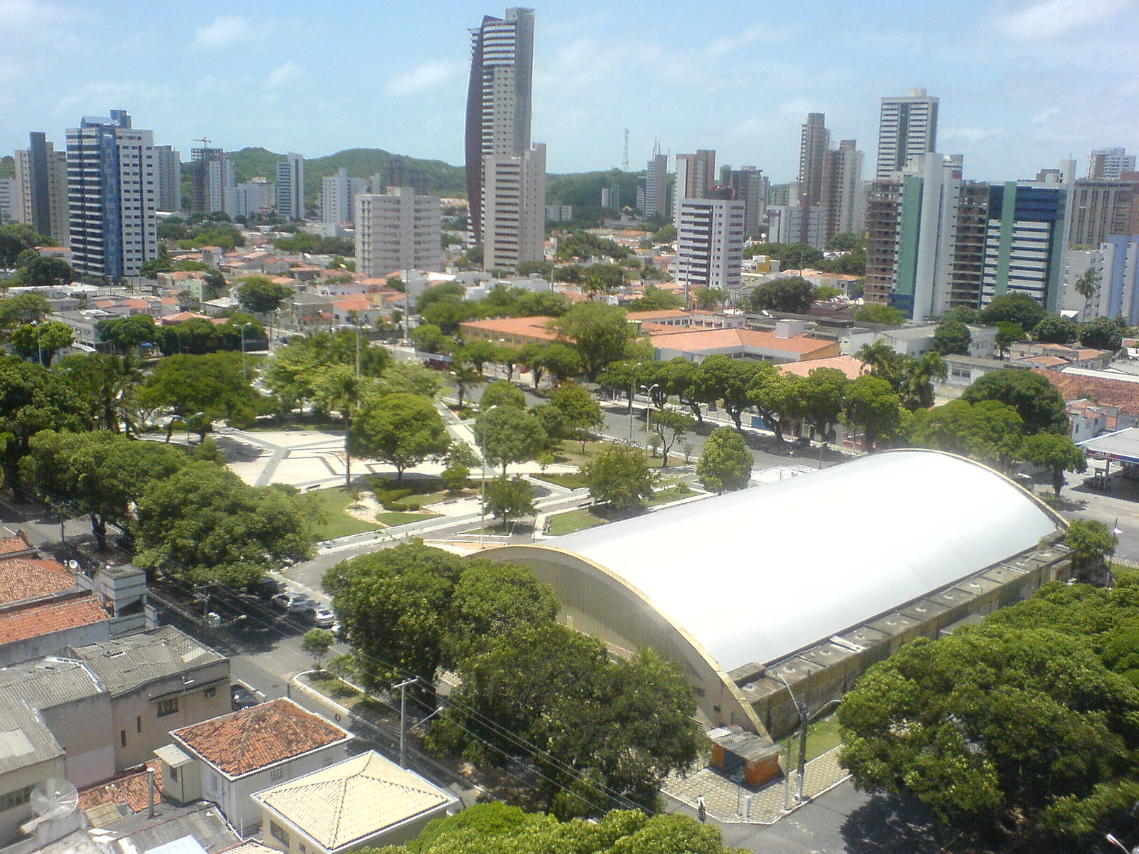 Praça Pedro Velho, em Natal/RN, Brasil.